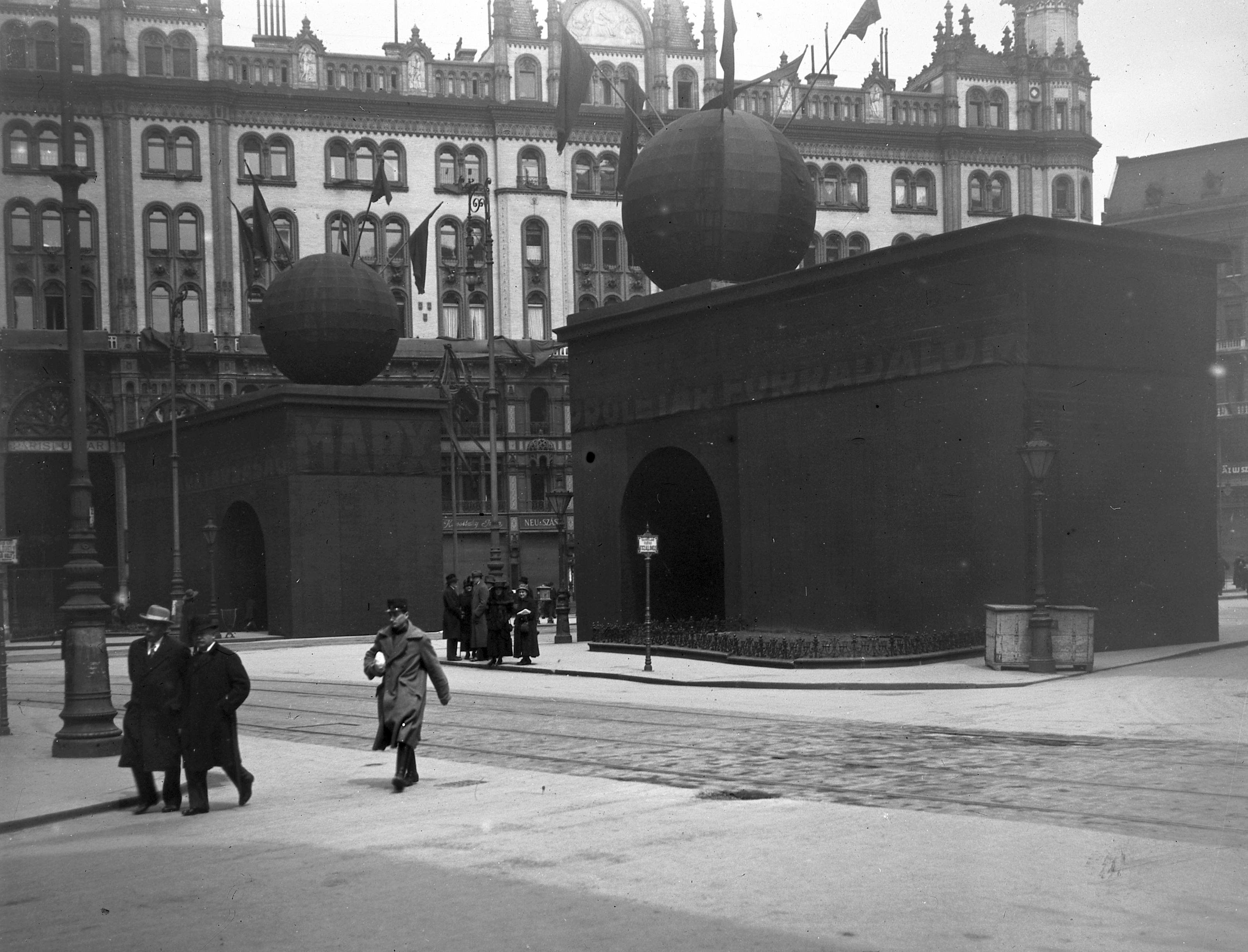 Ferenciek tere (Kígyó tér), háttérben a Párizsi udvar. Location: Hungary, Budapest V. Tags: Hungarian Soviet Republic, street view, political decoration, public building, 1st of May parade, Budapest, lamp post Title: Ferenciek tere (Kígyó tér), háttérben a Párizsi udvar.